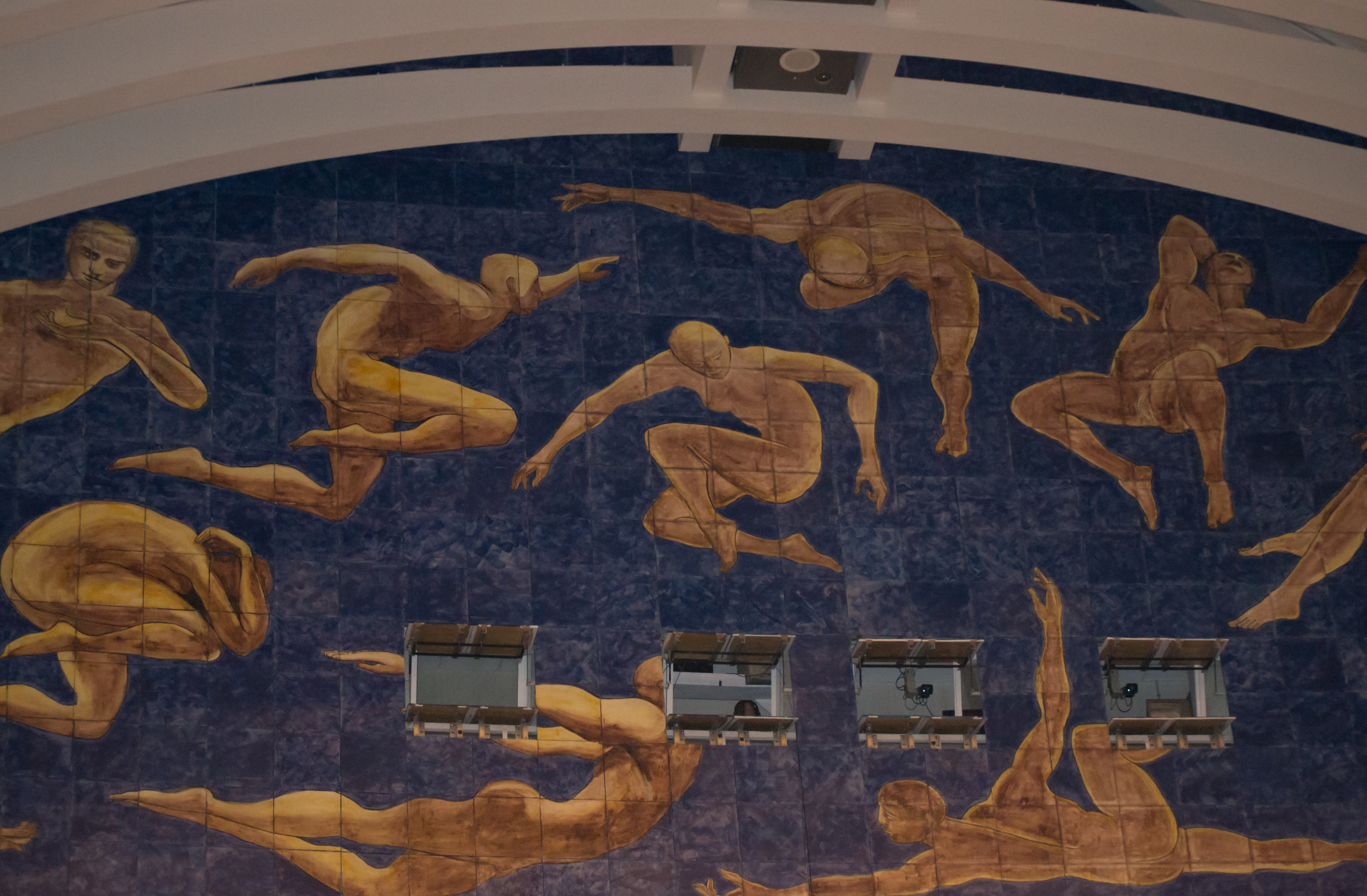 Detalle de la decoración del Auditorio del Palau de les Arts, fotografiada en la gala de inauguración de la novena edición del Festival Internacional de Mediometrajes La Cabina. Valencia, 3 de noviembre de 2016.